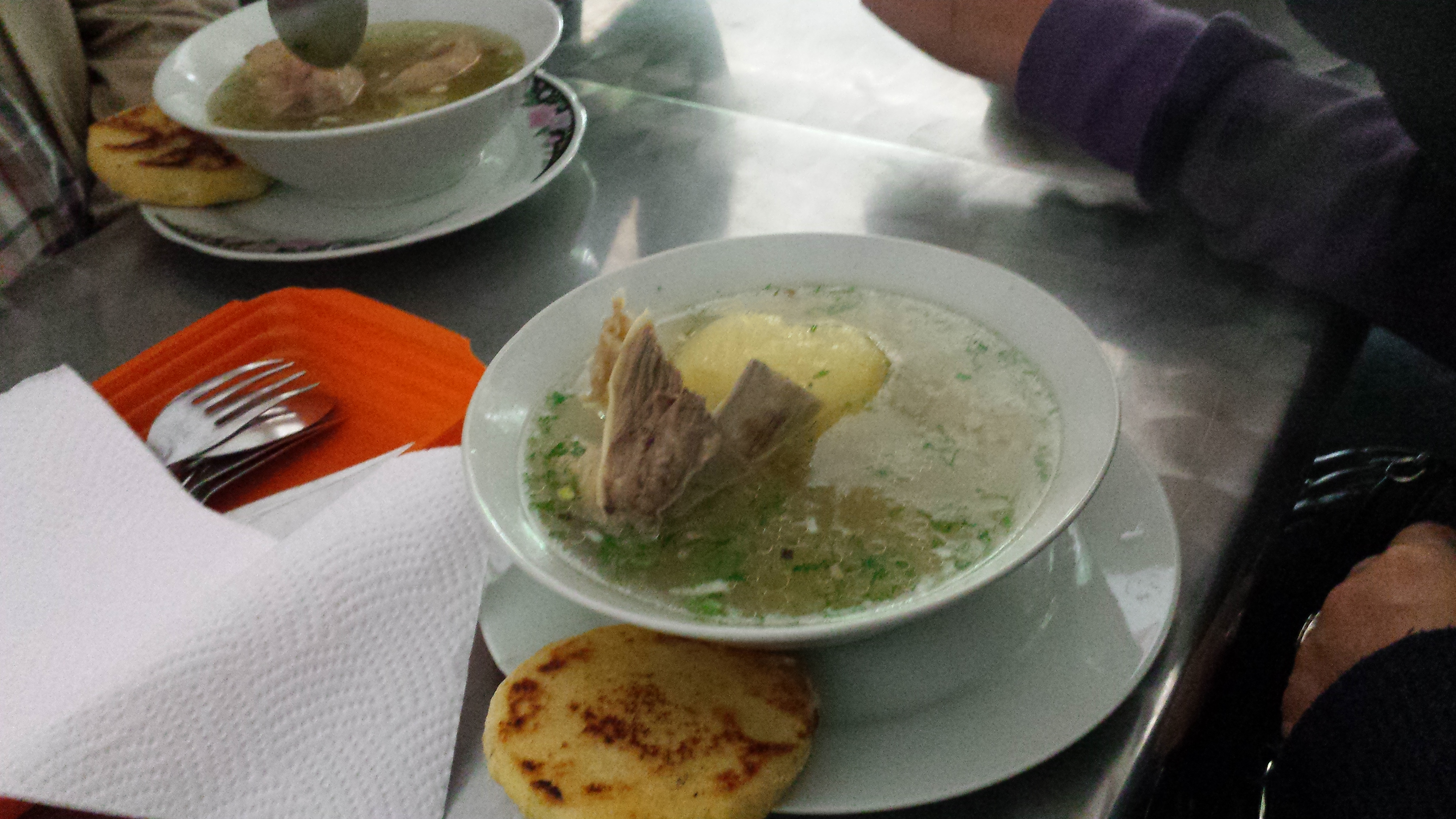 Caldo de costilla, plato típico de Colombia.